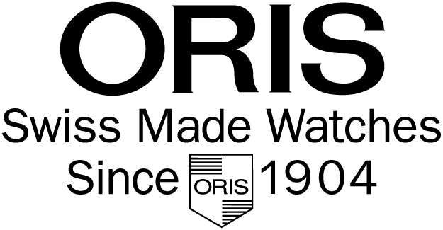 Oris Logo